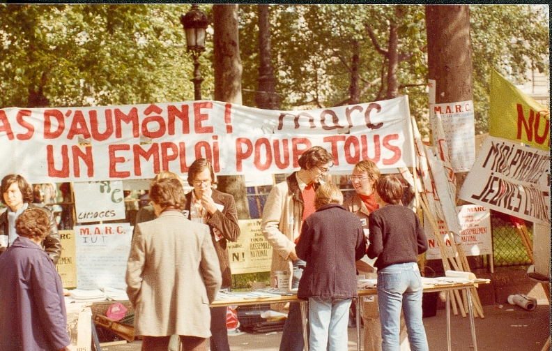 Manifestation du MARC, 1/05/1974